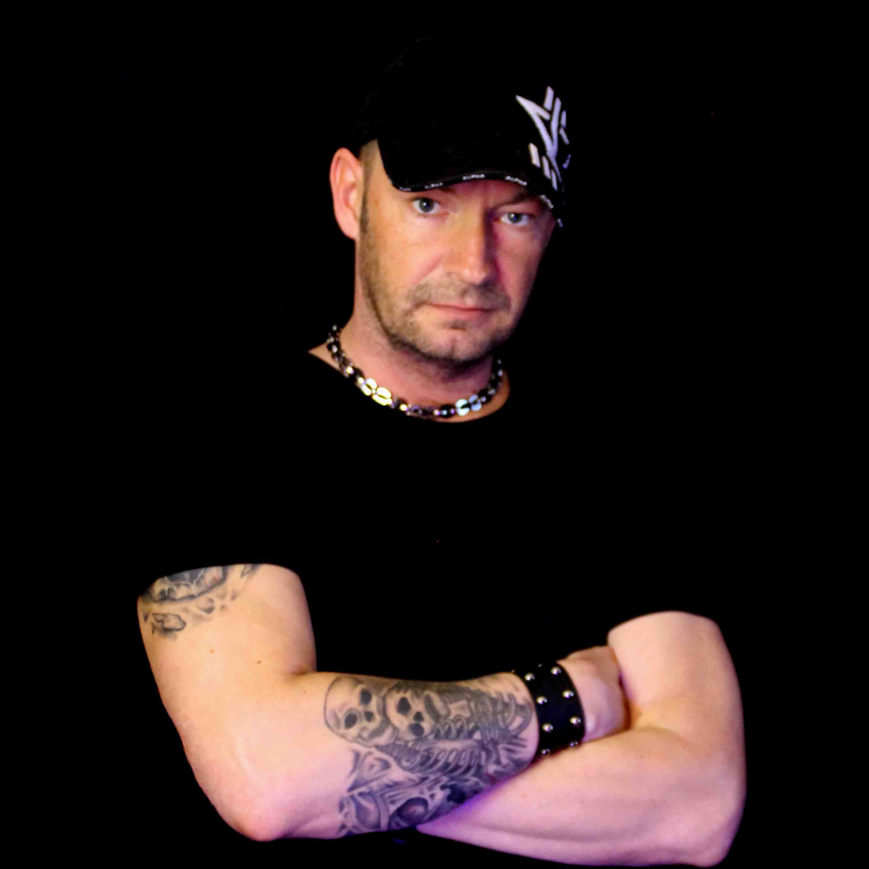 Frank Schröter Profilbild